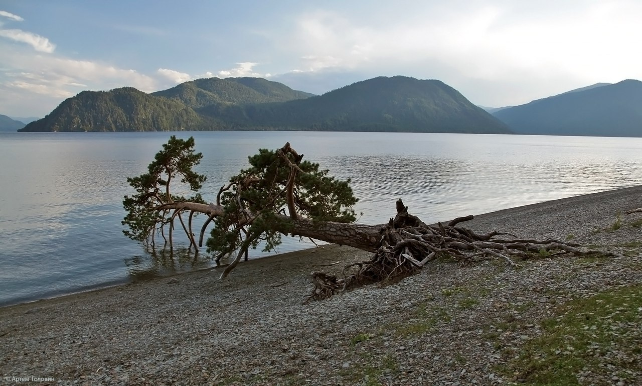 Поклонная сосная Яйлю